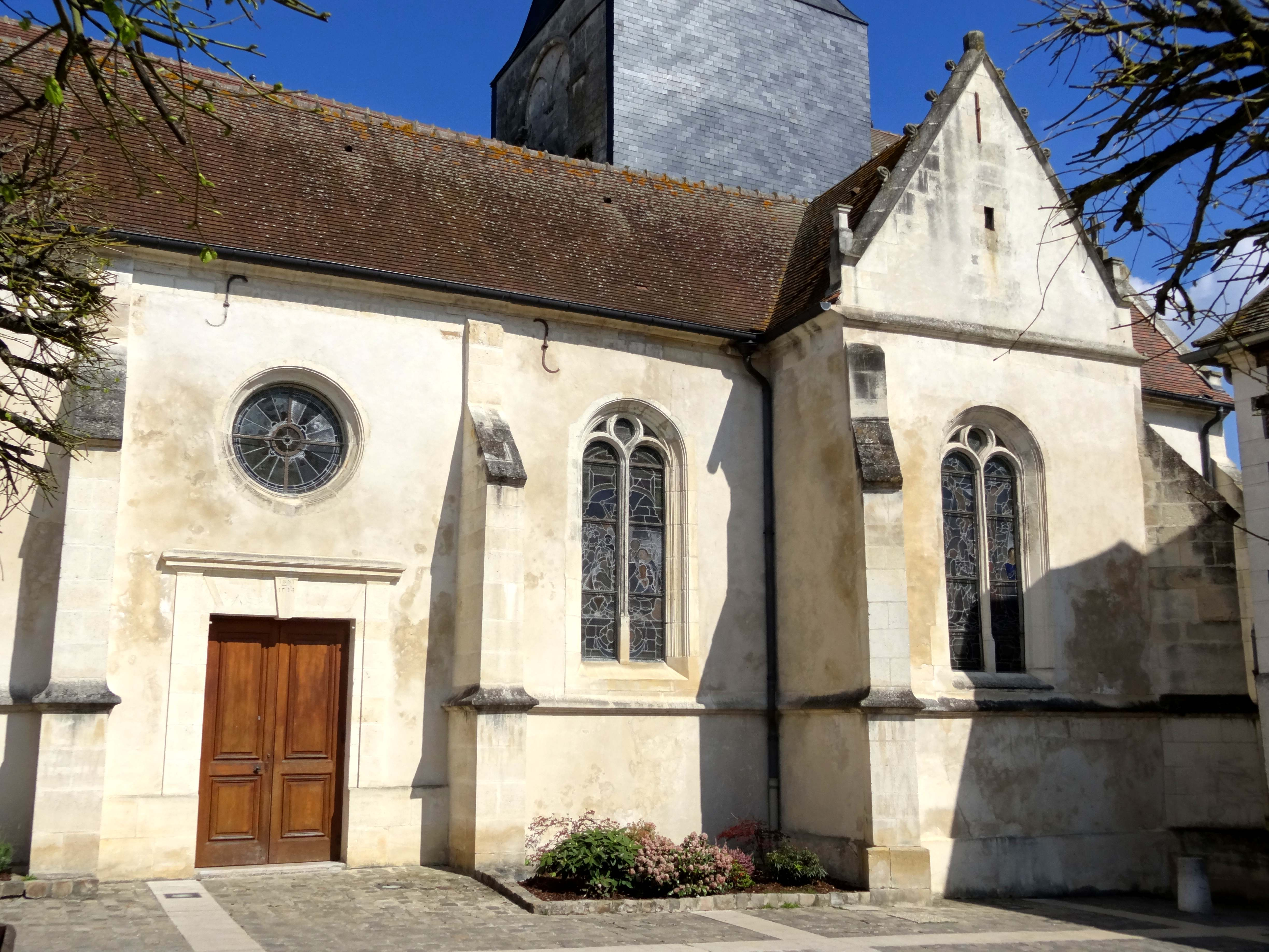 Église Saint-Lucien de Méru - voir titre.